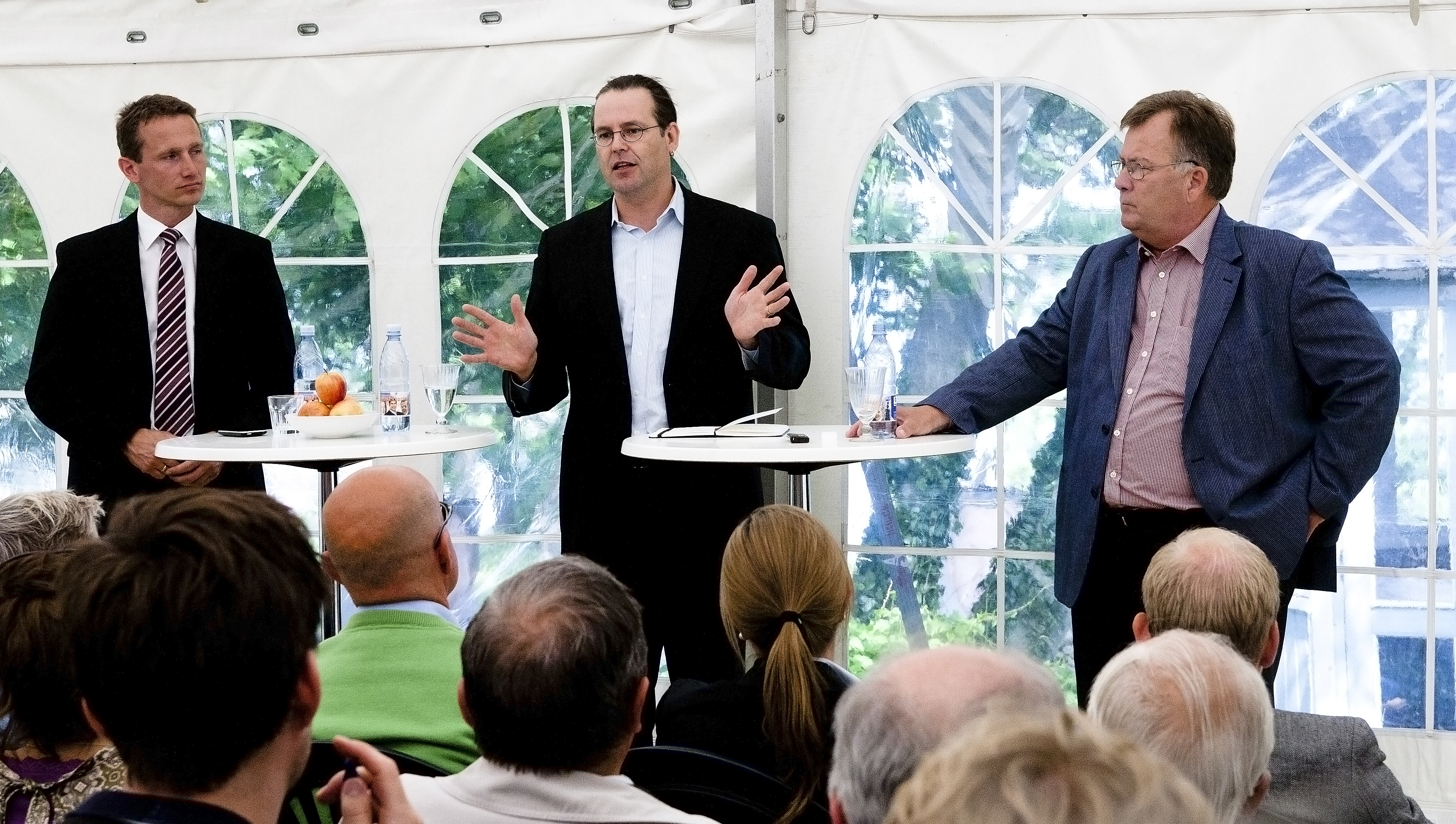 Sveriges finansminister Anders Borg (m) talar vid danska politikermötet Folkemødet i Allinge på Bornholm den 15 juni 2011.